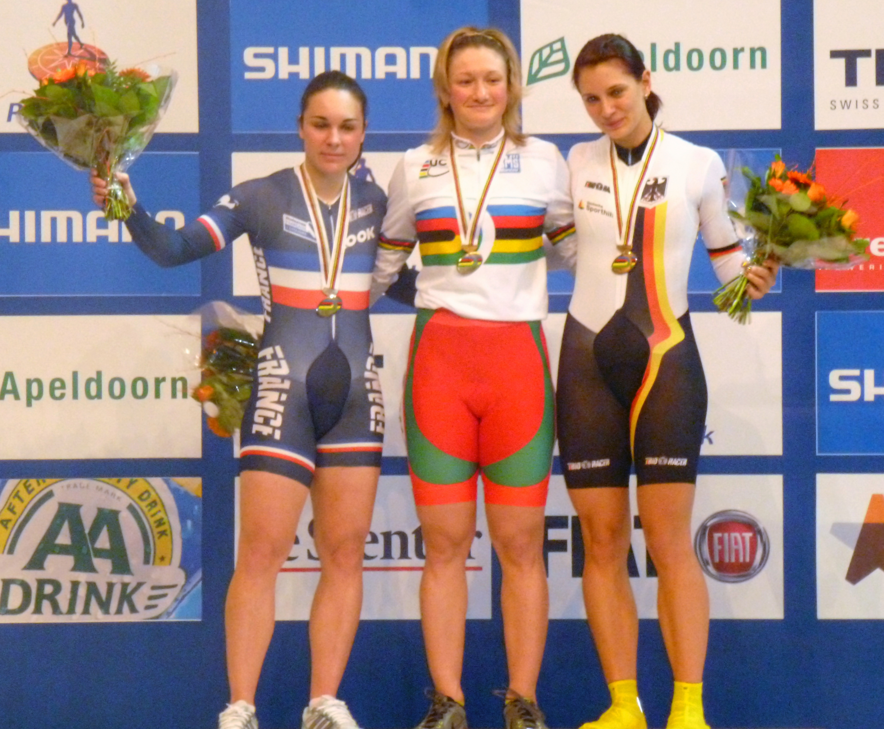 Podium Zeitfahren Frauen WM 2011 in Apeldoorn, v.l.n.r. Sandie Clair, Olga Panarina, Miriam Welte